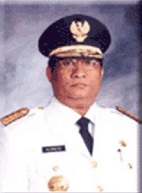 Gubernur Sulawesi Tenggara Periode 2003-2008